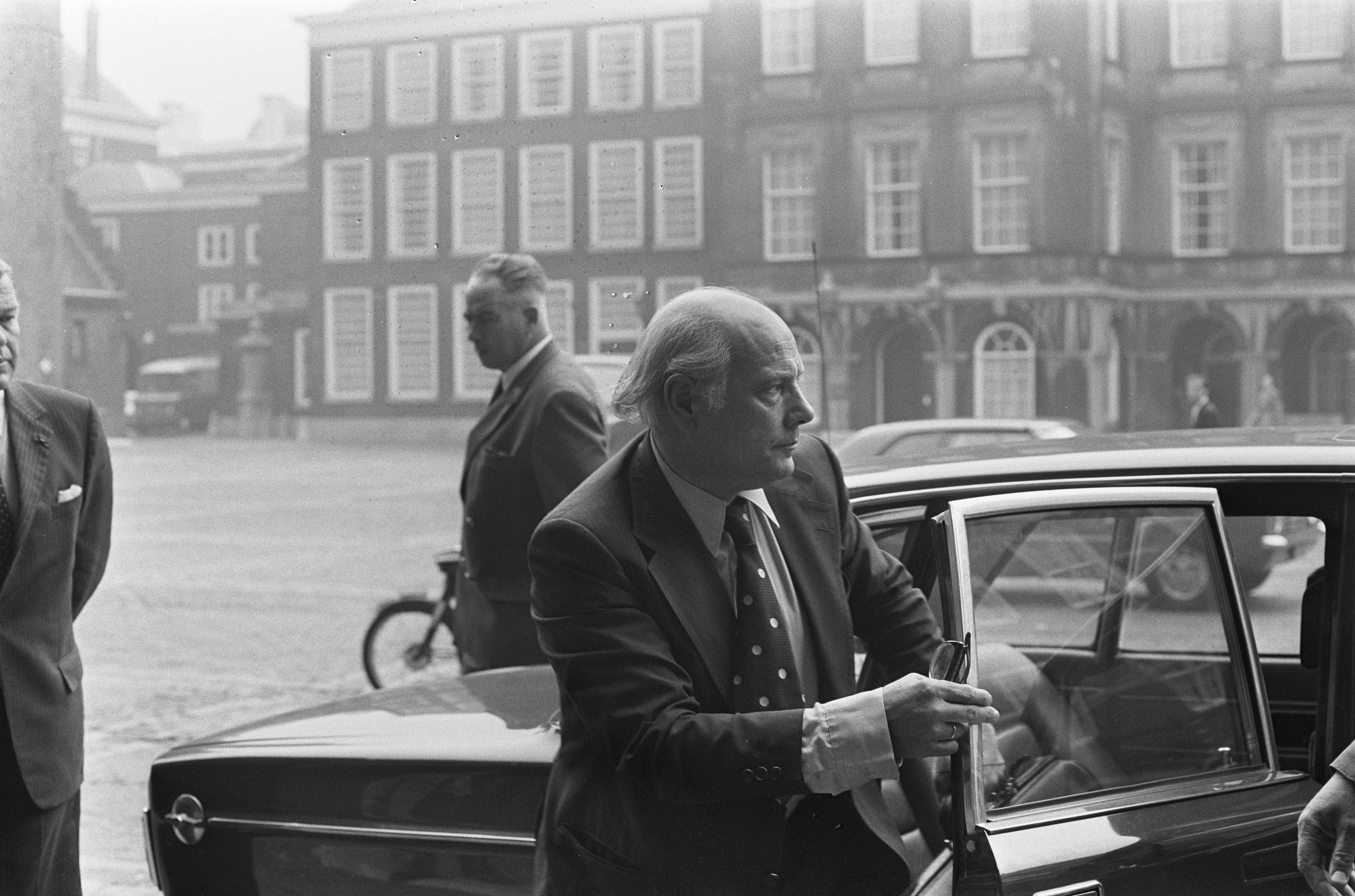 Collectie / Archief : Fotocollectie Anefo Reportage / Serie : [ onbekend ] Beschrijving : Gijzeling in Den Haag ; minister president Den Uyl op weg naar persconferentie in gebouw Eerste Kamer Datum : 16 september 1974 Locatie : Den Haag, Zuid-Holland Trefwoorden : gijzelingen, persconferenties Persoonsnaam : Uyl, Joop den Fotograaf : Mieremet, Rob / Anefo Auteursrechthebbende : Nationaal Archief Materiaalsoort : Negatief (zwart/wit) Nummer archiefinventaris : bekijk toegang 2.24.01.05 Bestanddeelnummer : 927-4541